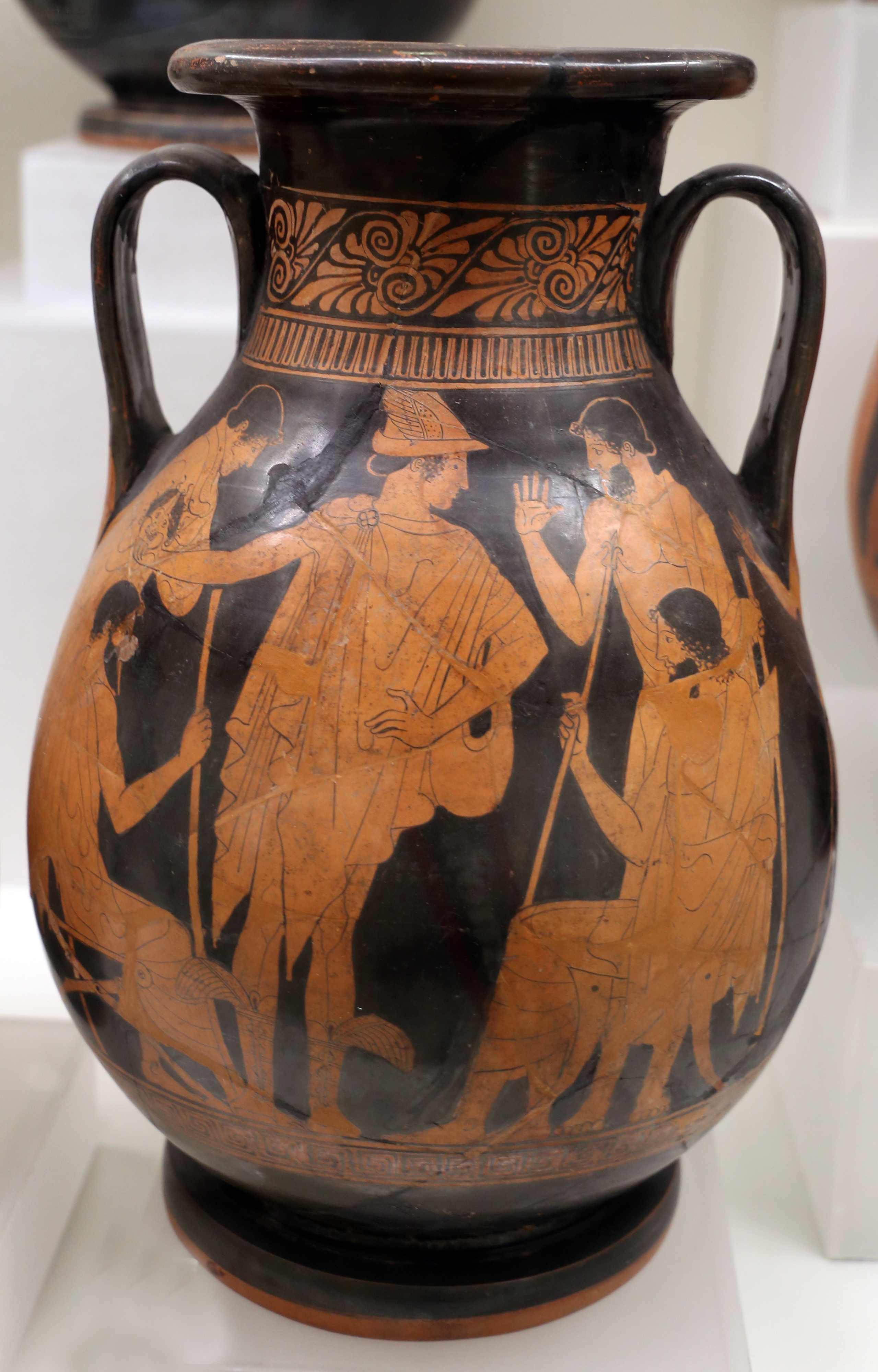 Villa Giulia (Rome) This is a photo of a monument which is part of cultural heritage of Italy.